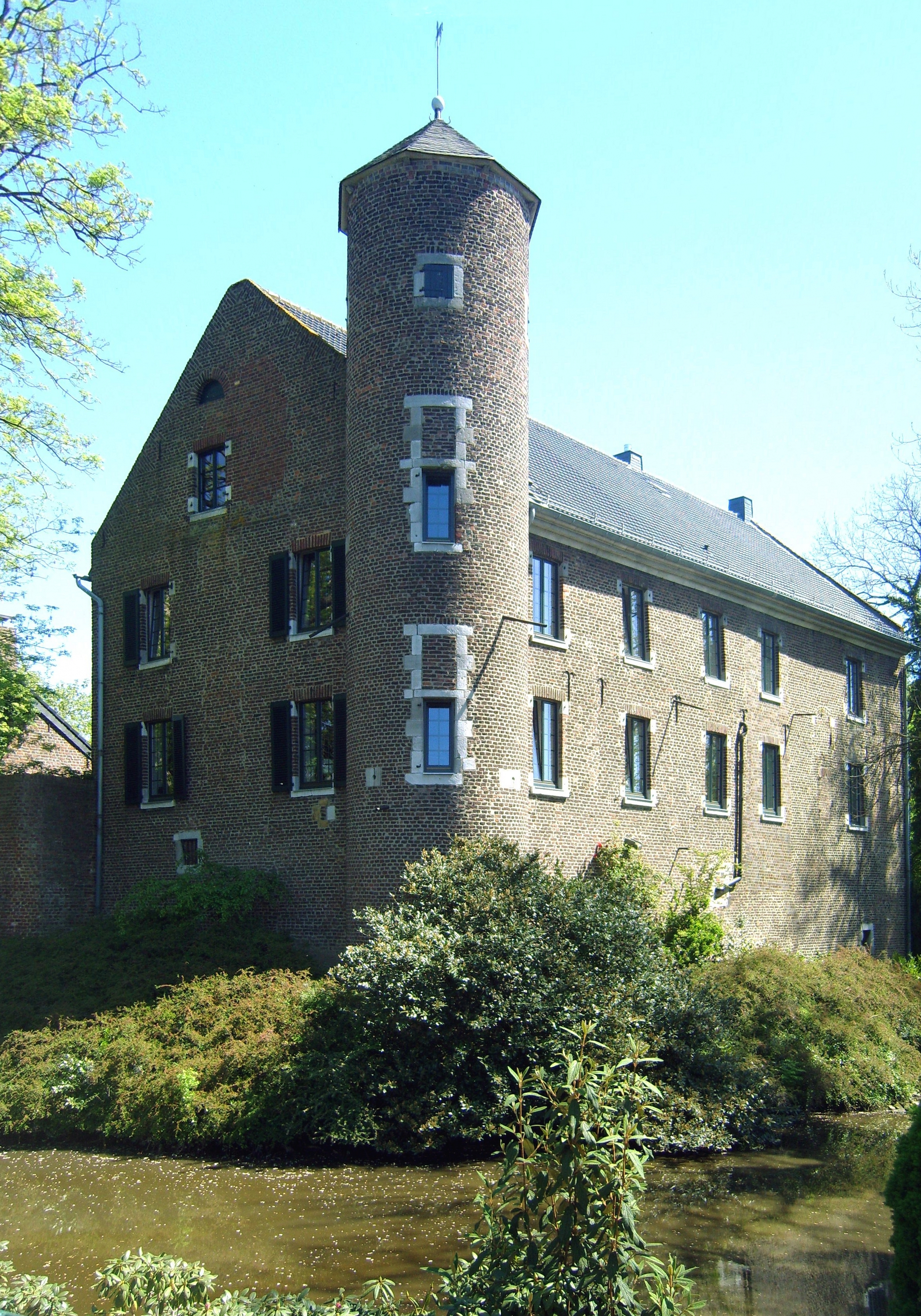 Burg Dürboslar in Dürboslar